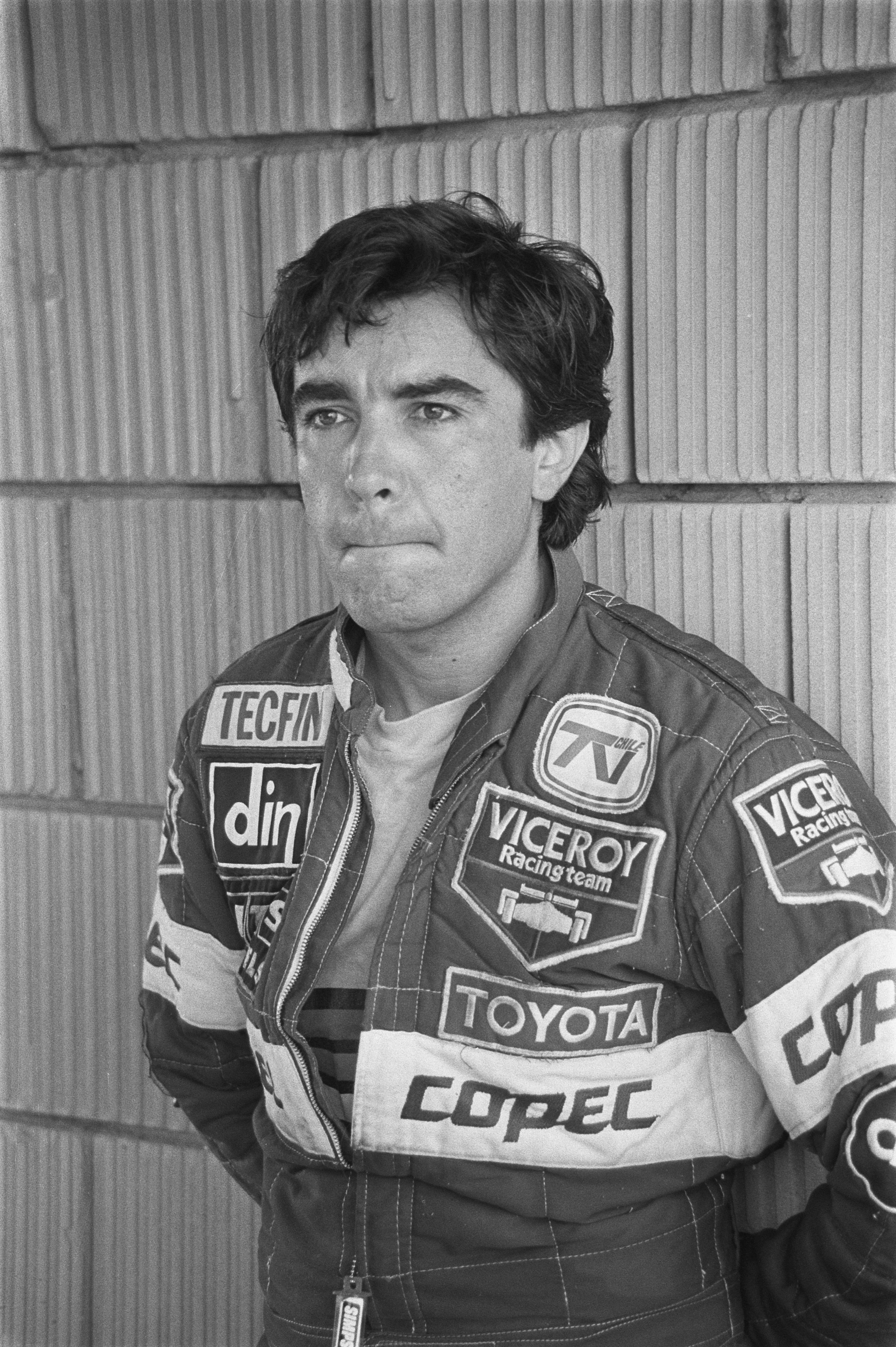 Eliseo Salazar lors du Grand Prix des Pays-Bas 1982 à Zandvoort